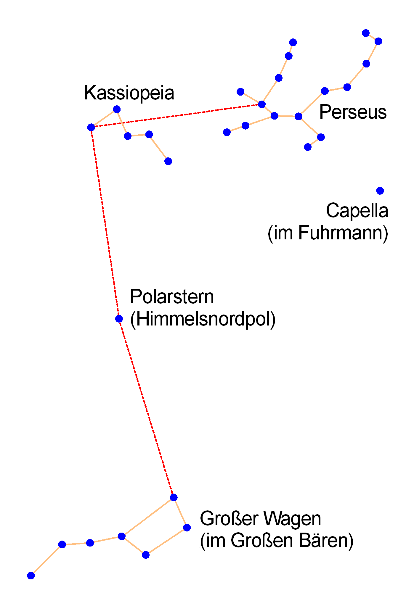 Himmelsskizze zum Auffinden vom Sternbild "Perseus" mit Hilfe von "Großer Wagen" und "Polarstern"